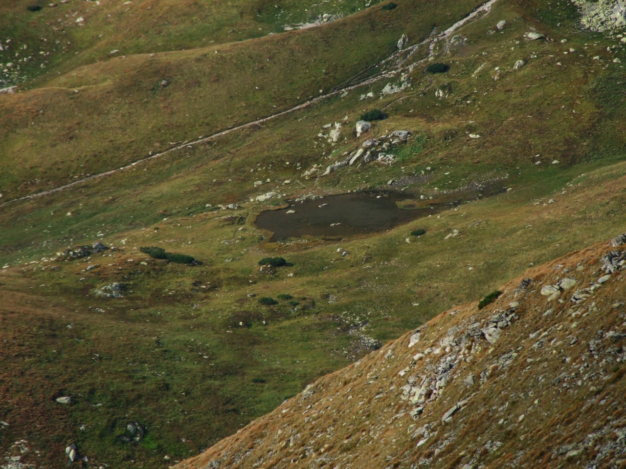 Żarski Stawek (Tatry Zachodnie)